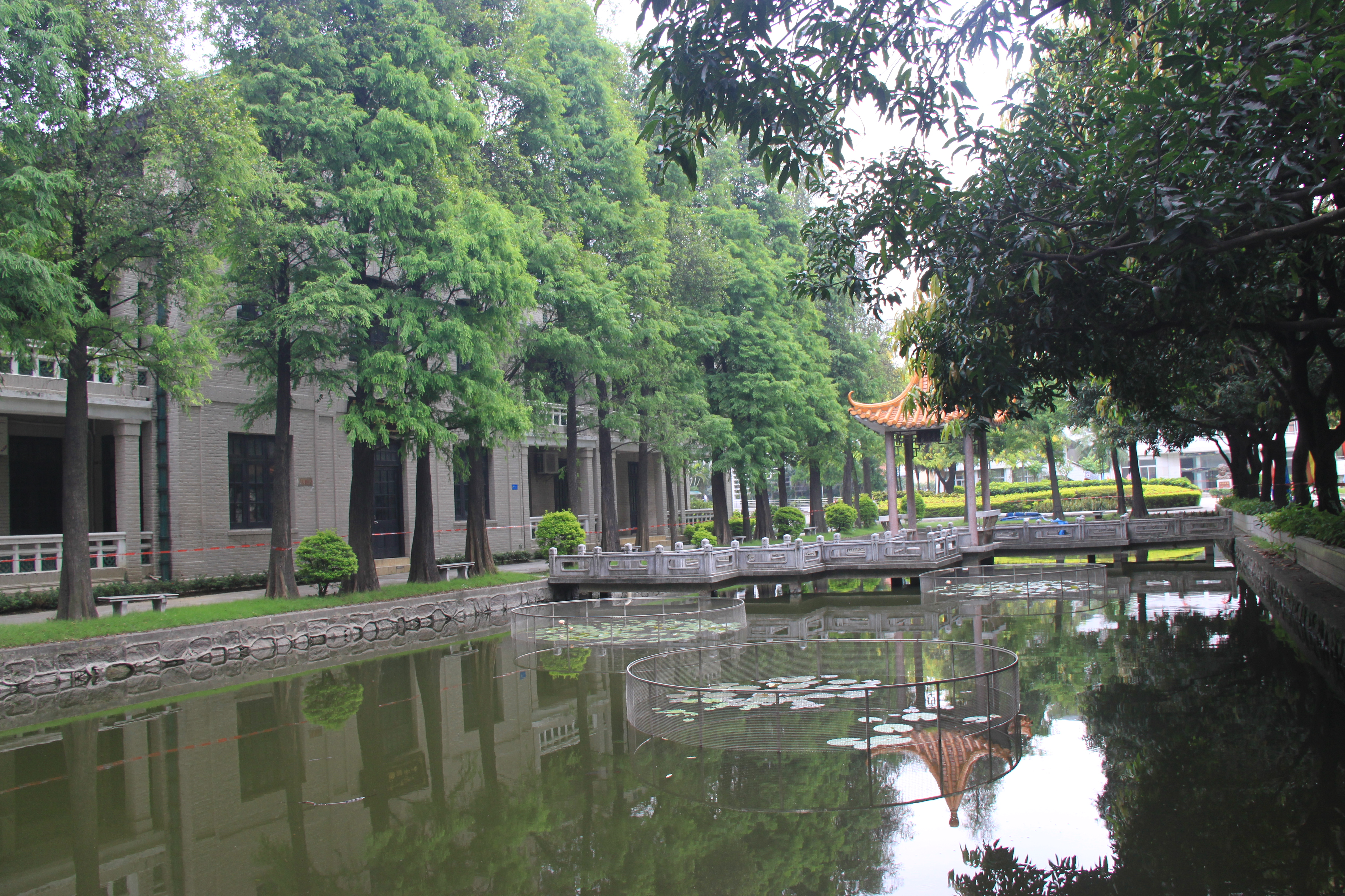 旧图与荷花池